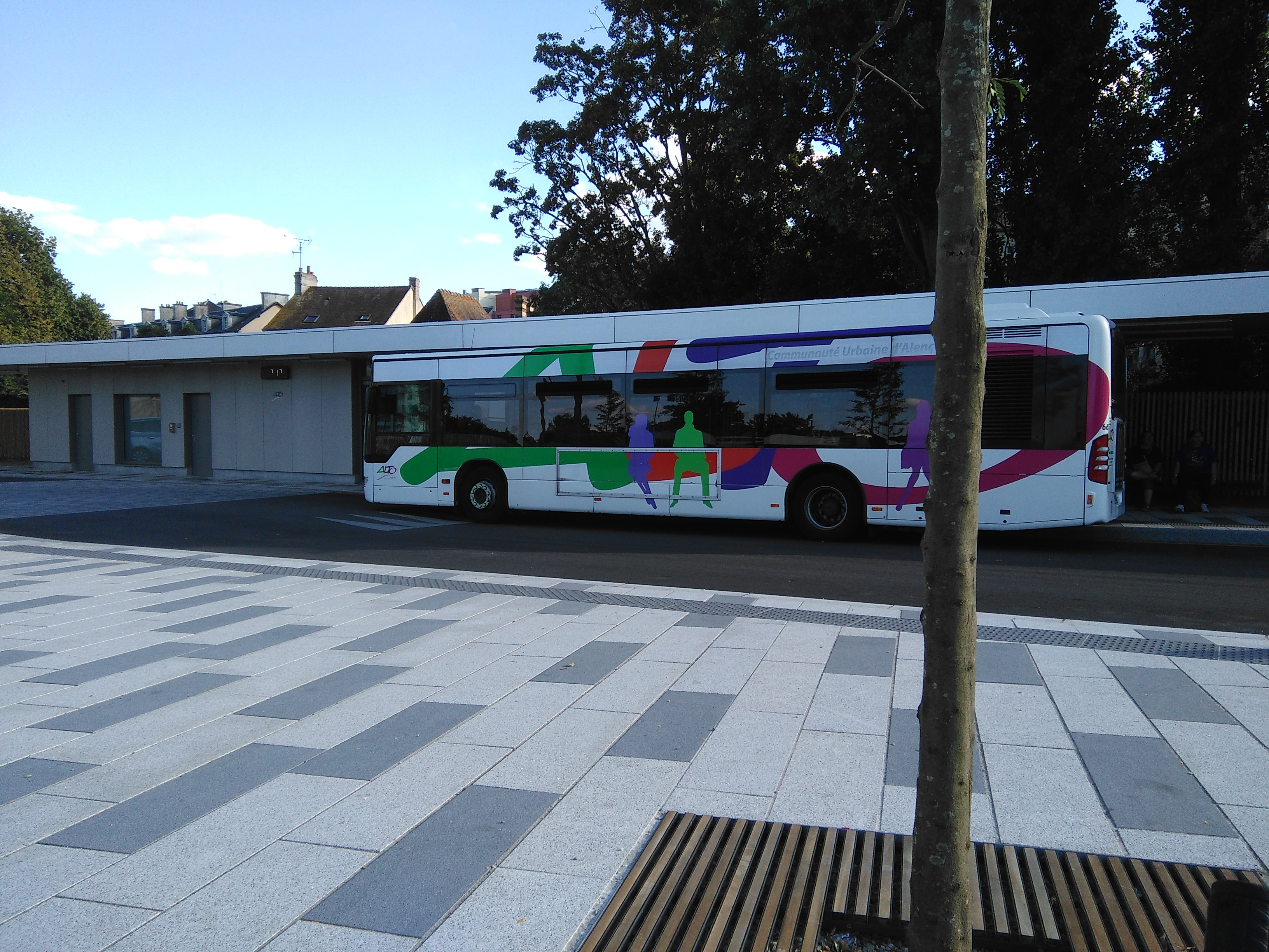 Mercedes citaro altobus